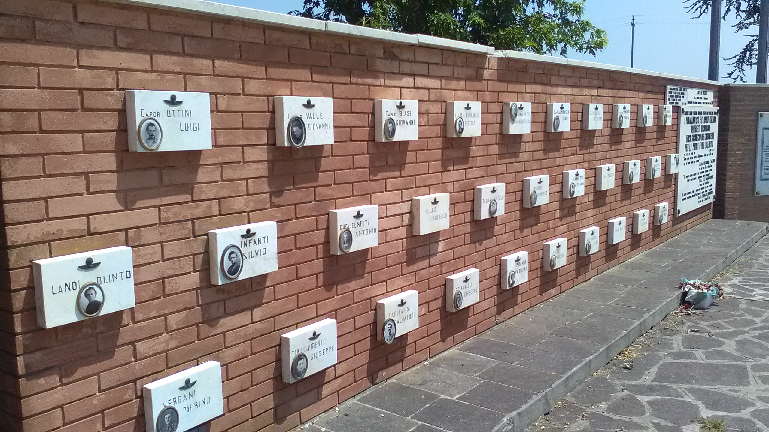 Monumento Operazione Herring - Dragoncello